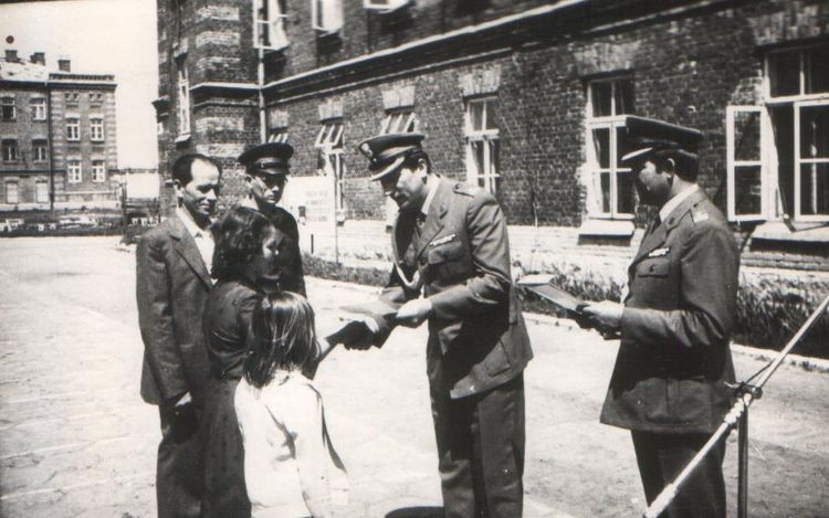 Przasnysz, 1976r. Przysięga wojskowa. Dowódca JW 3832 mjr Łuczkiewicz wręcza pismo pochwalne dla rodziców wyróżnionego żołnierza